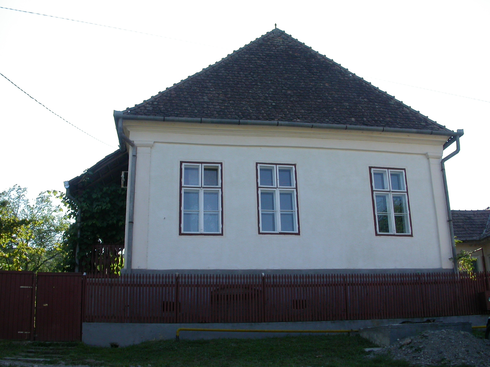 Casa parohială a bisericii romano-catolice, 1812